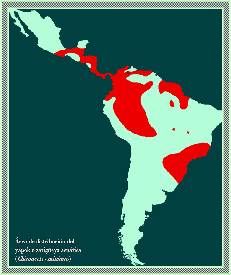 Mapa del área de distribución de Chironectes minimus.